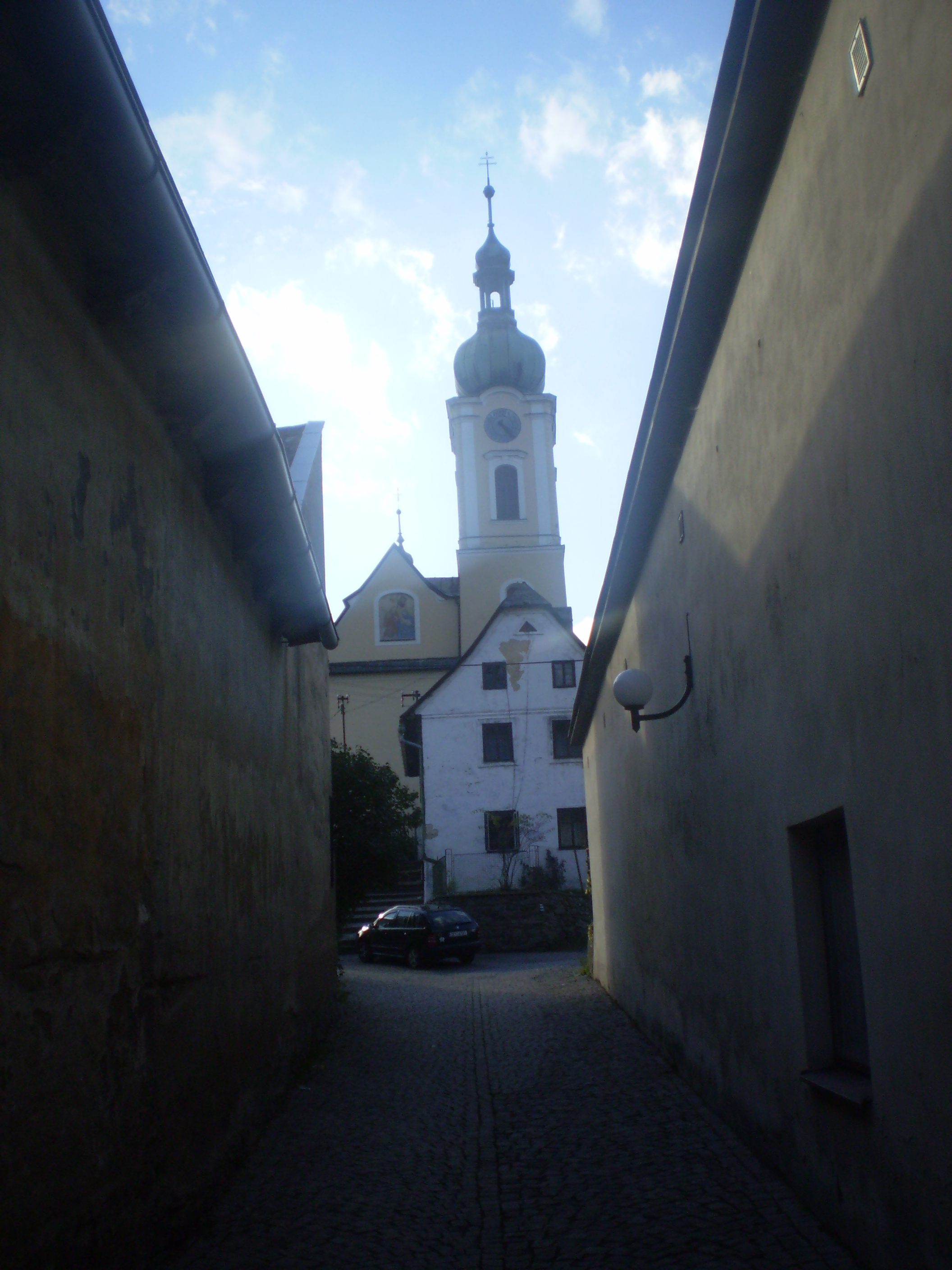 Kostelní ulička v Jimramově